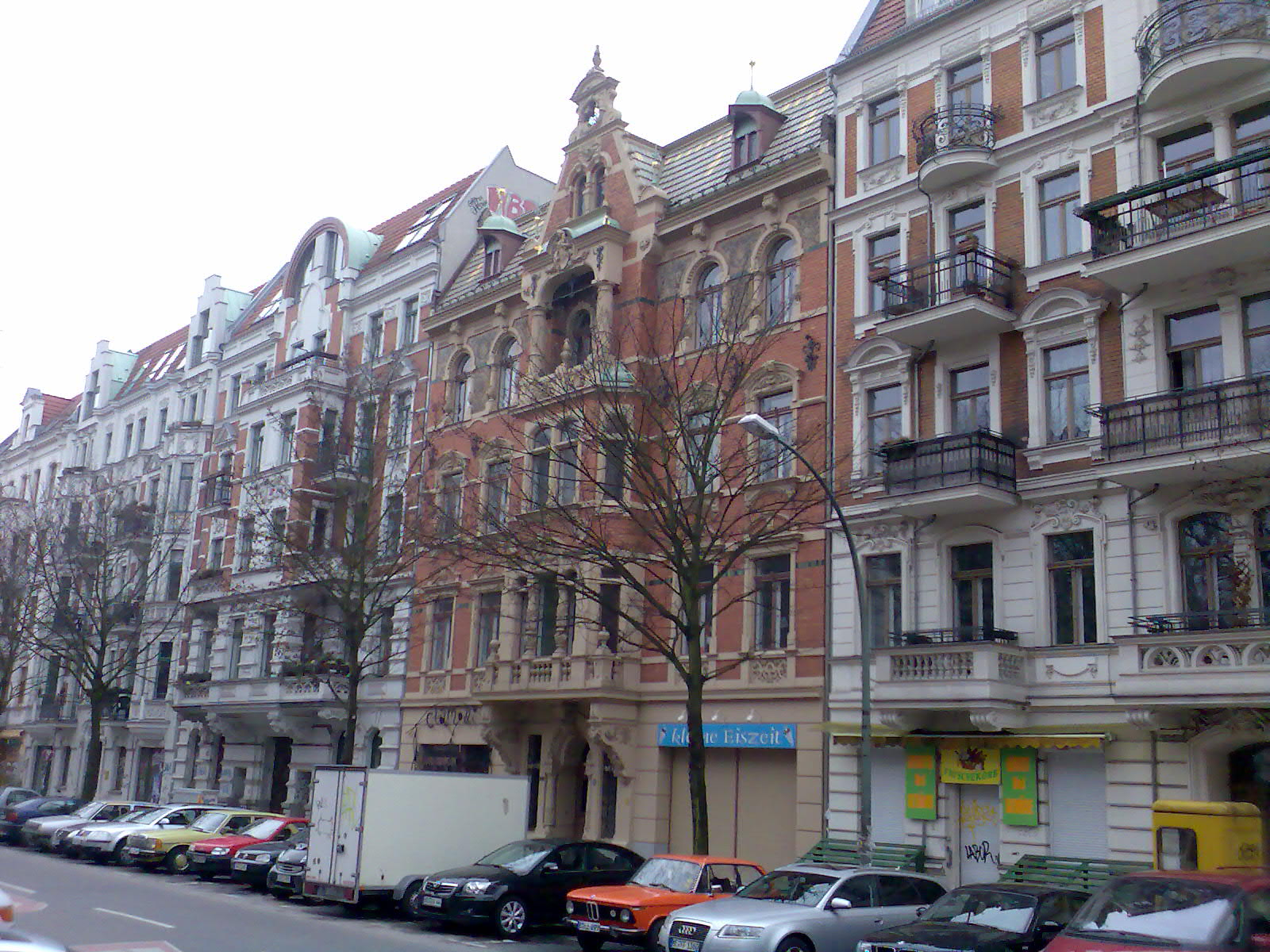 Stargarder Strasse (Höhe Gethsemane-Kirche, Blickrichtung ost)